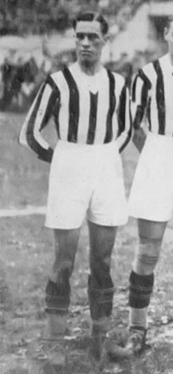 Il calciatore italiano Oreste Barale alla Juventus nella stagione 1930-31.